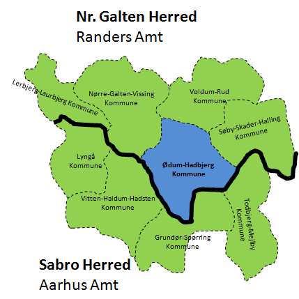 Kort over den gamle sognekommune